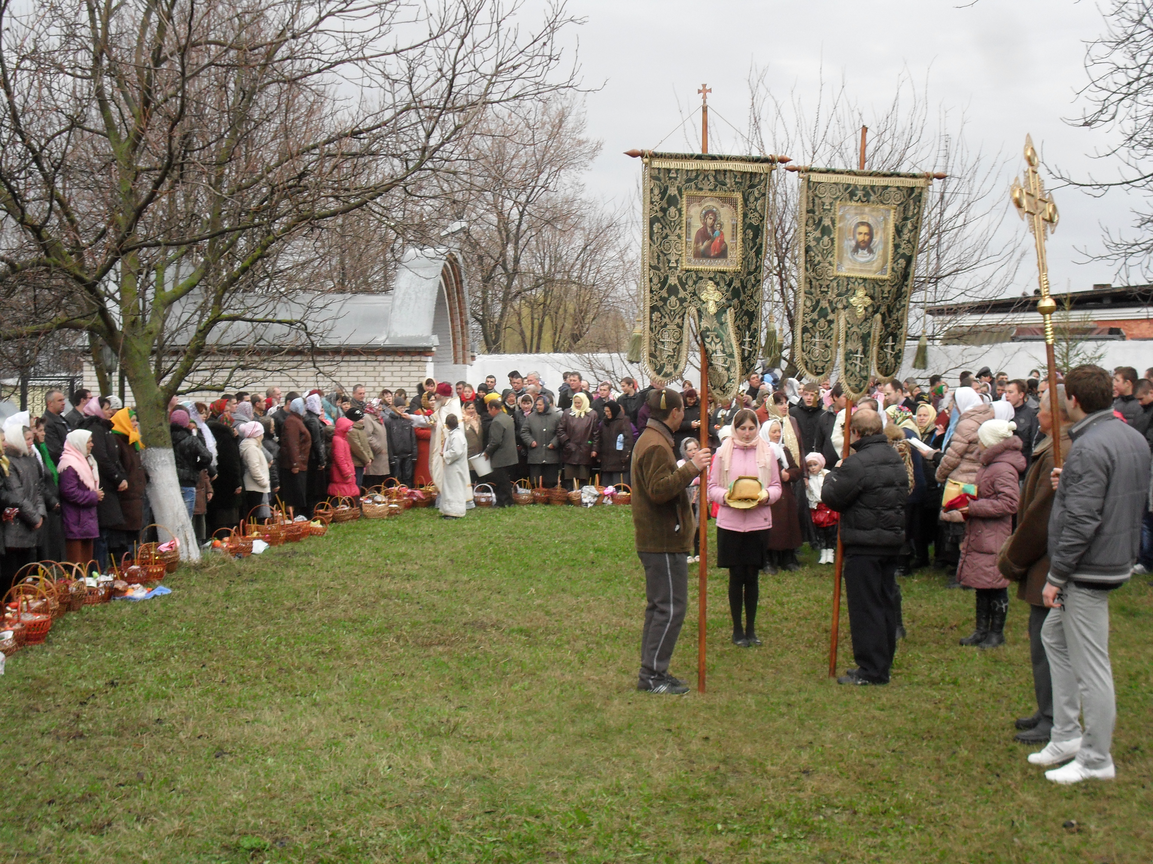 Святкування Великодня у с. Клебань (15.04.2012р.)